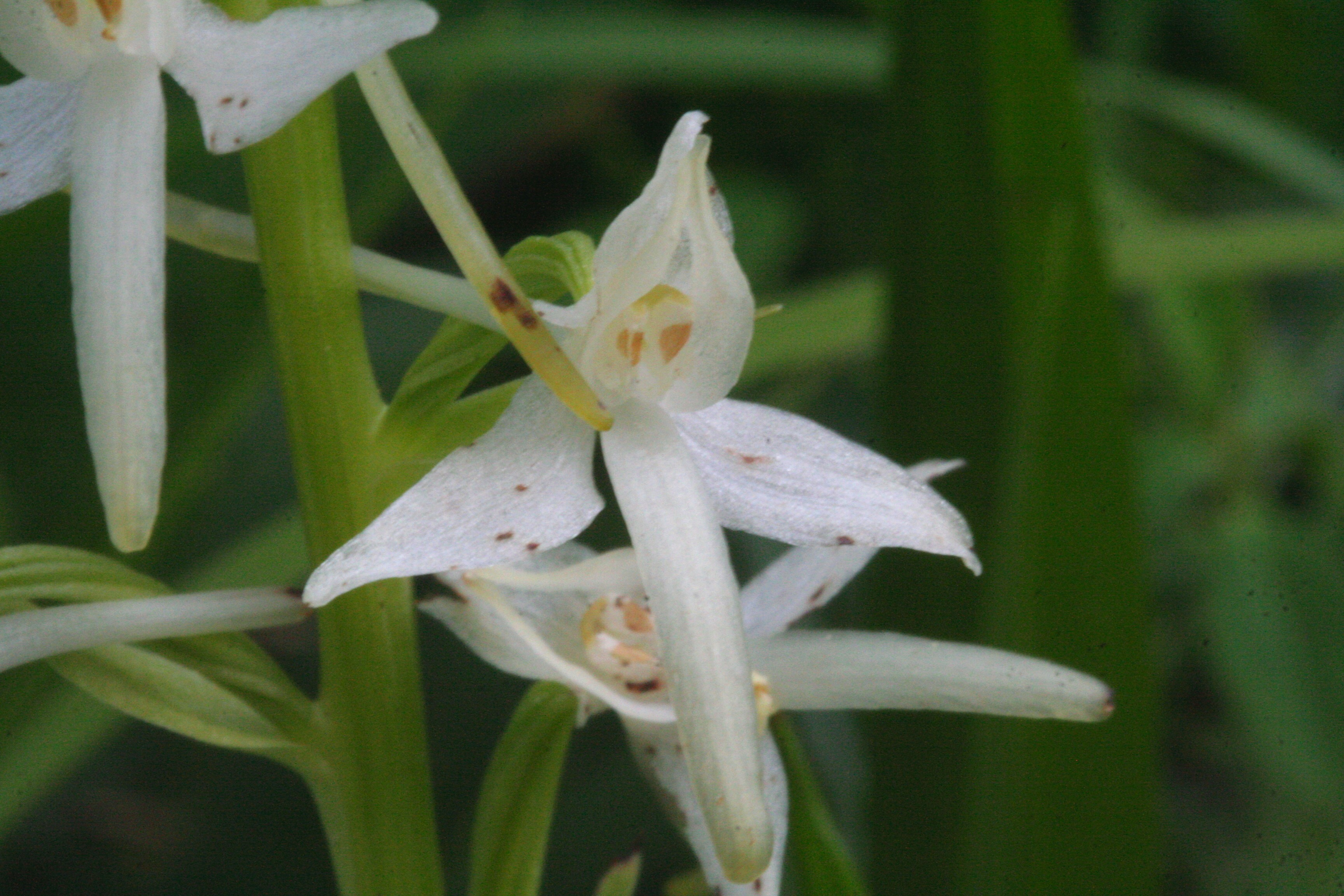 Platantera comune - Località: Val Piana, Limana (BL), 850 m s.l.m.